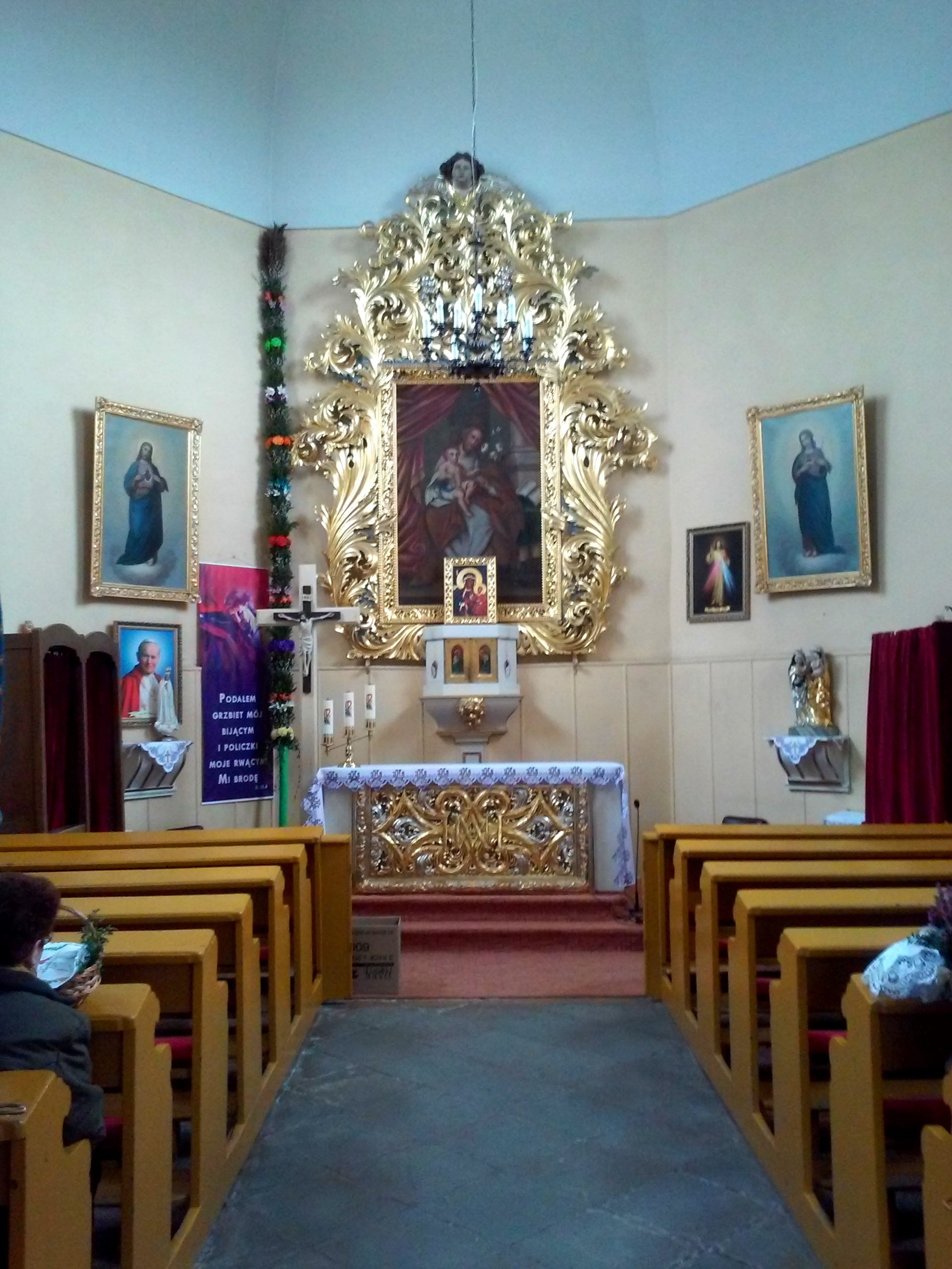 Przedwojów, kościół św. Józefa Oblubieńca Wikidata has entry Q30046249 with data related to this item.